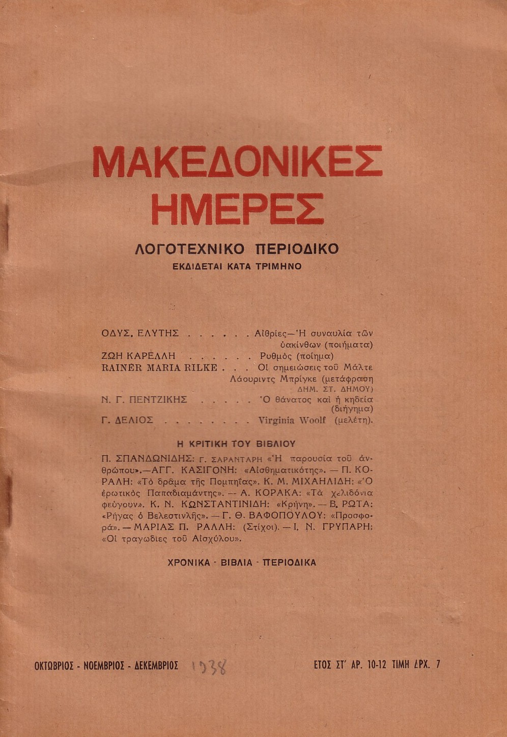 Първа страница на списание "Македоникес Имерес".